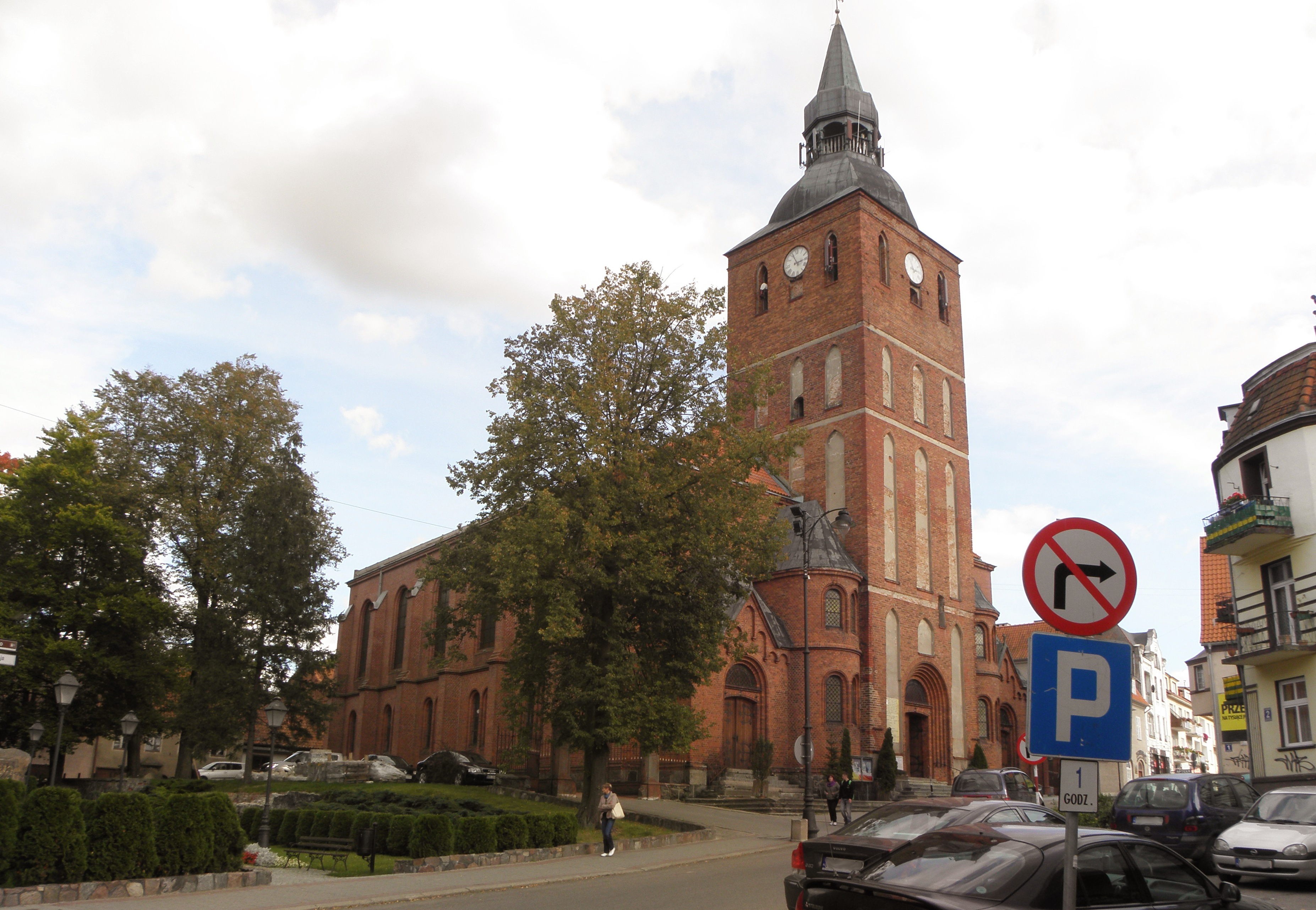 Kościół św. Jana Chrzciciela (zabytek nr 122 (B/12) i A-19 z dn. 13.08.1949)